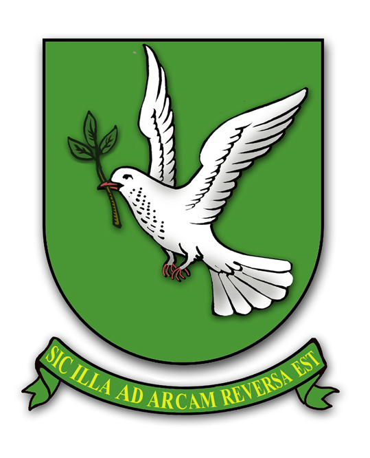 Brasão primitivo de Salvador: Em campo de sinople, uma pomba branca com um ramo de oliveira no bico; num listel em letras de ouro, o mote: Sic illa ad arcam reversa est.